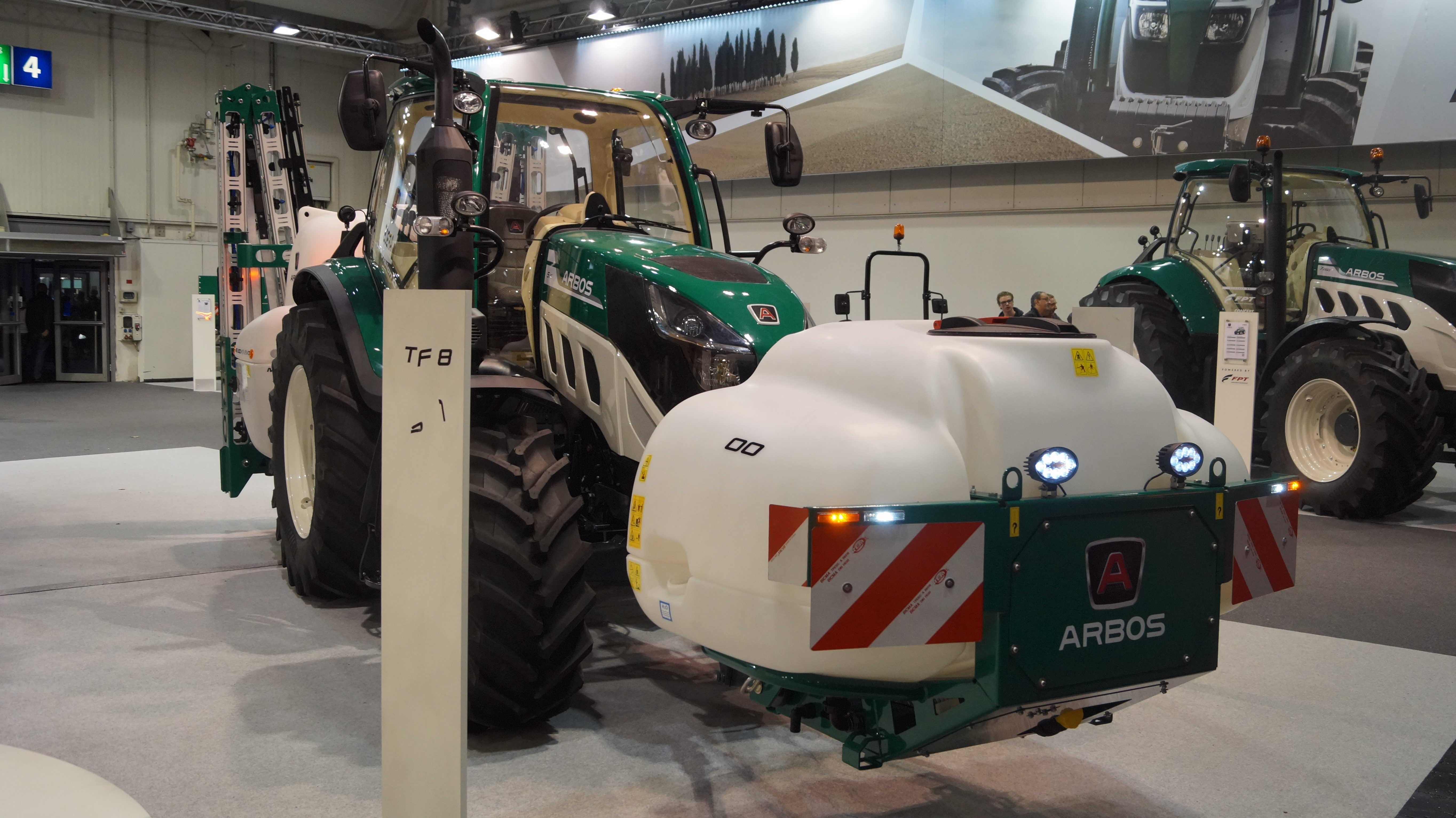 Schrägansicht der Front eines Arbos 5115, ausgestellt auf der Agritechnica 2017.